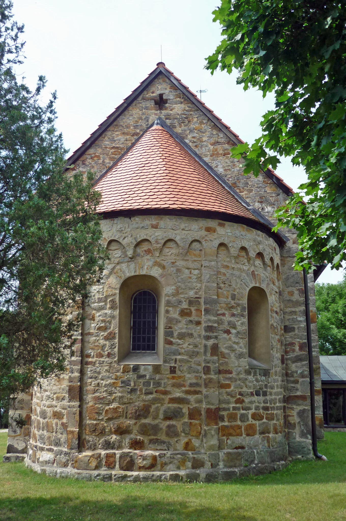 St.Thomas-Kirche in Pretzien, Apsis